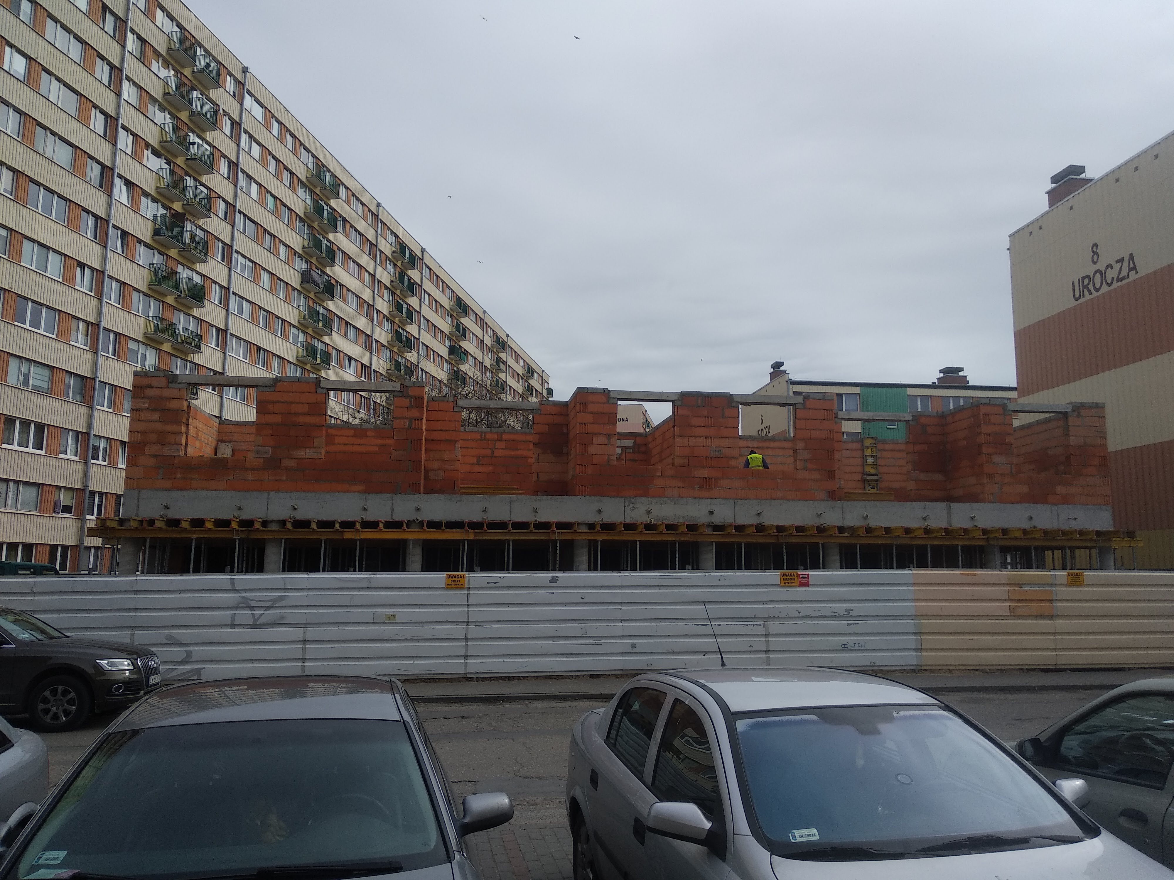 Ul. Sielska (2020 r.)